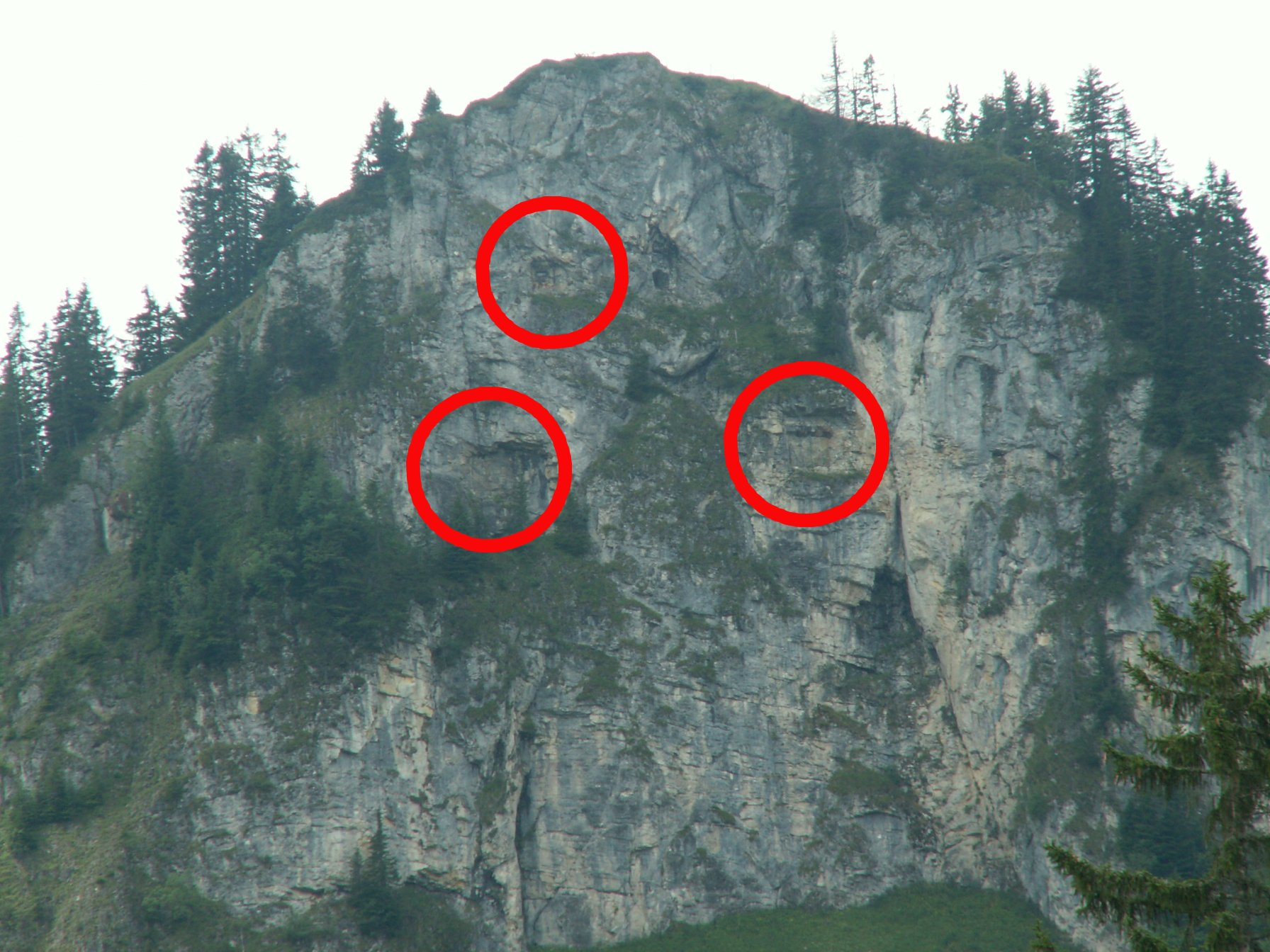 Getarnte Schiessscharten des Werks Euschels (CH) Kt. FR